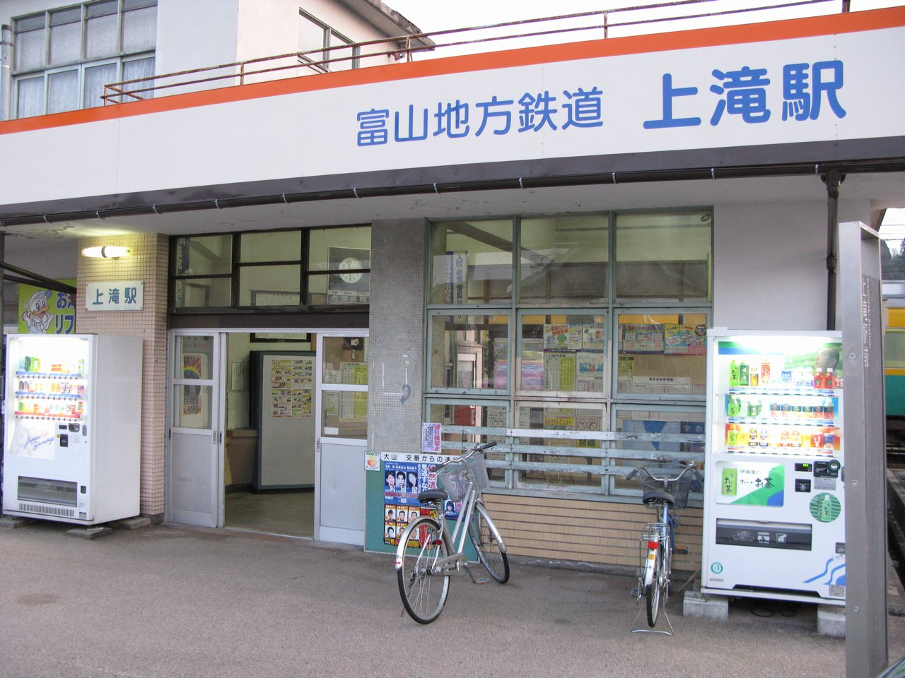 Kamidaki Station